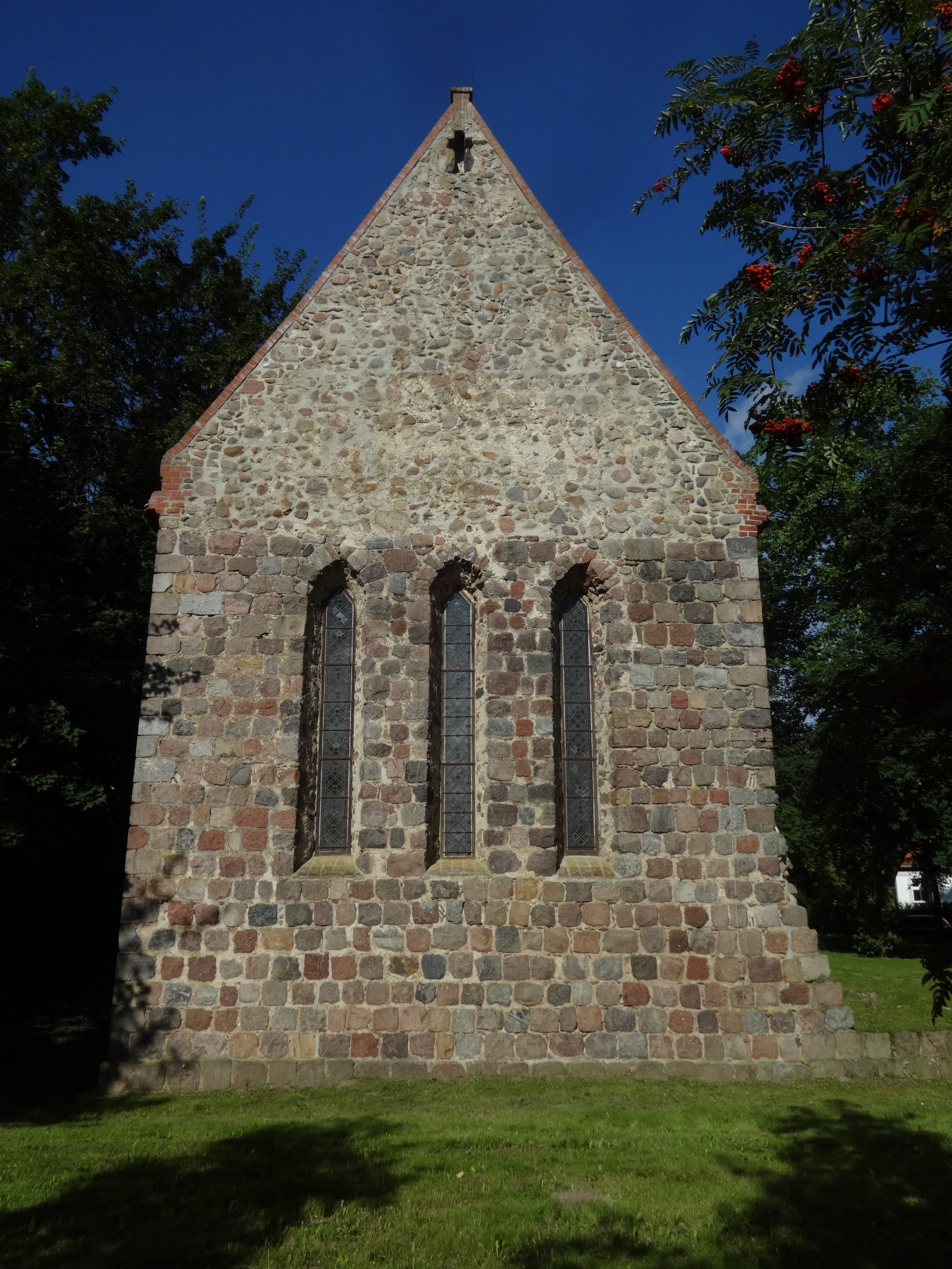 Die Feldsteinkirche in Rollwitz entstand vermutlich im 13. Jahrhundert. Der Chor sollte ursprünglich nach Westen hin durch ein breiteres Kirchenschiff ergänzt werden. Im Innern steht unter anderem ein Kanzelaltar aus dem Jahr 1731.